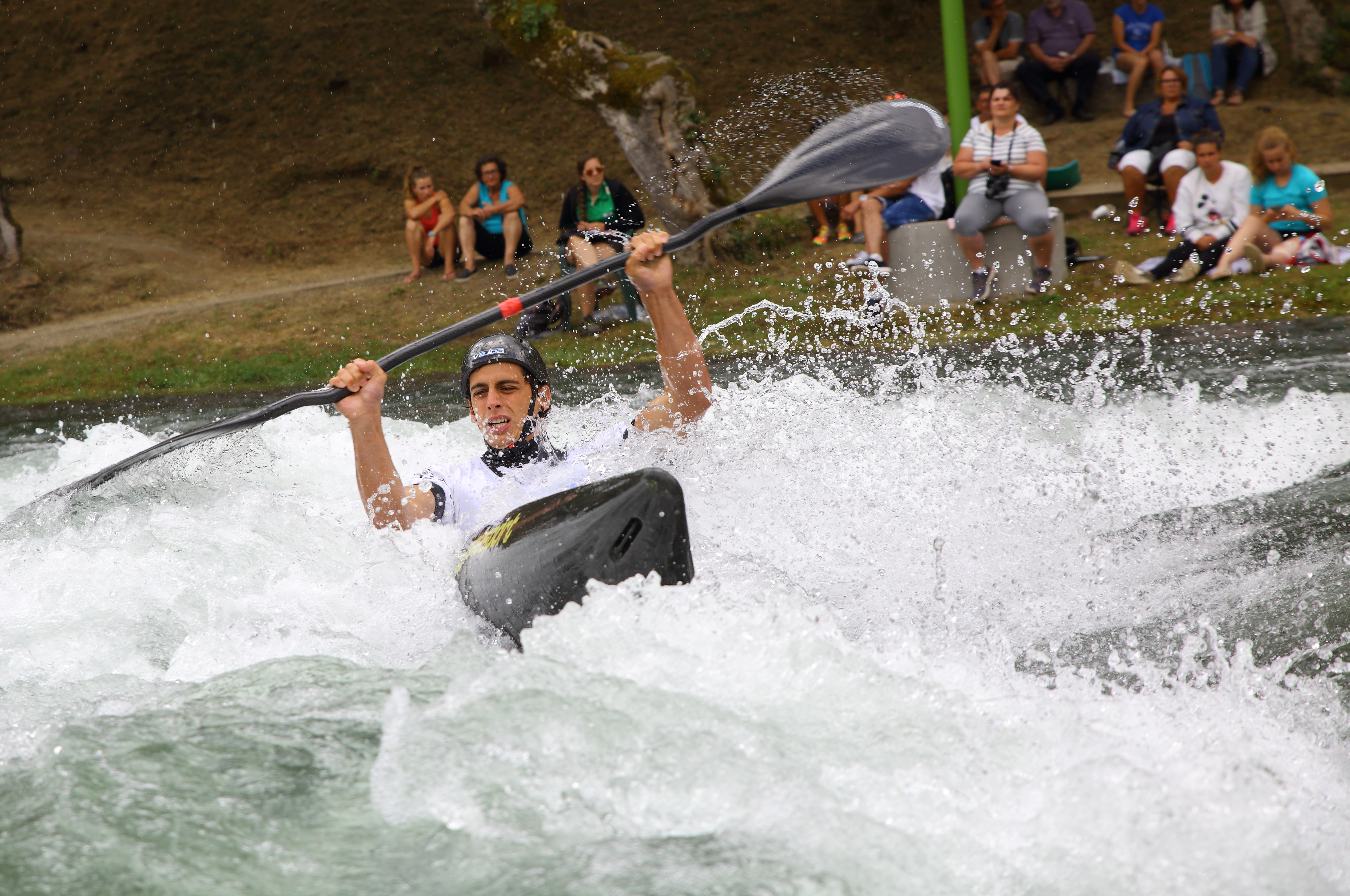 Alejico, Sabero, Leon. Celebrado el 5 y 6 de agosto